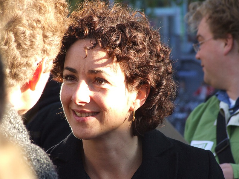 Femke Halsema in Nijmegen.